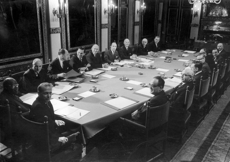 Eerste vergadering van het kabinet Cals (1965-1966). Den Haag, 15 april 1965. Rond de tafel, linkerkant: De Haseth (Antillen), Einaar (Suriname), Bot, Luns, Biesheuvel, Vondeling, Cals, Samkalden, Smallenbroek. Aan de rechterzijde: Bogaers, Veldkamp, Suurhoff, Diepenhorst, Vrolijk, De Jong, Den Uyl.